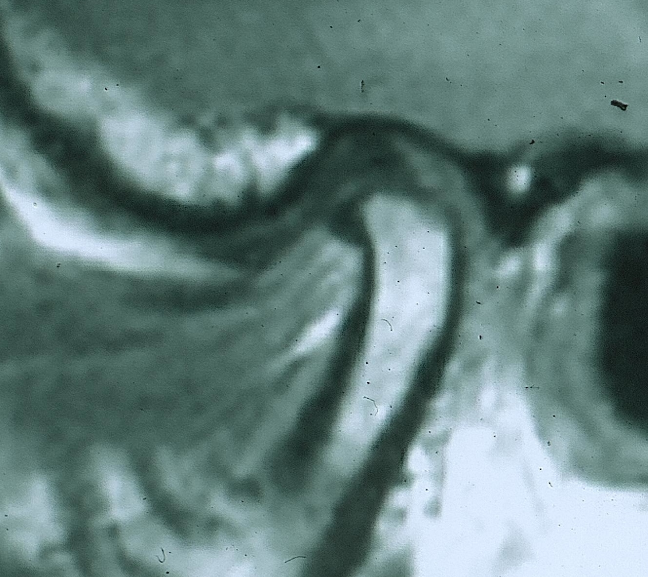 ARTICULACION TEMPOROMANDIBULAR (resonancia magnética)